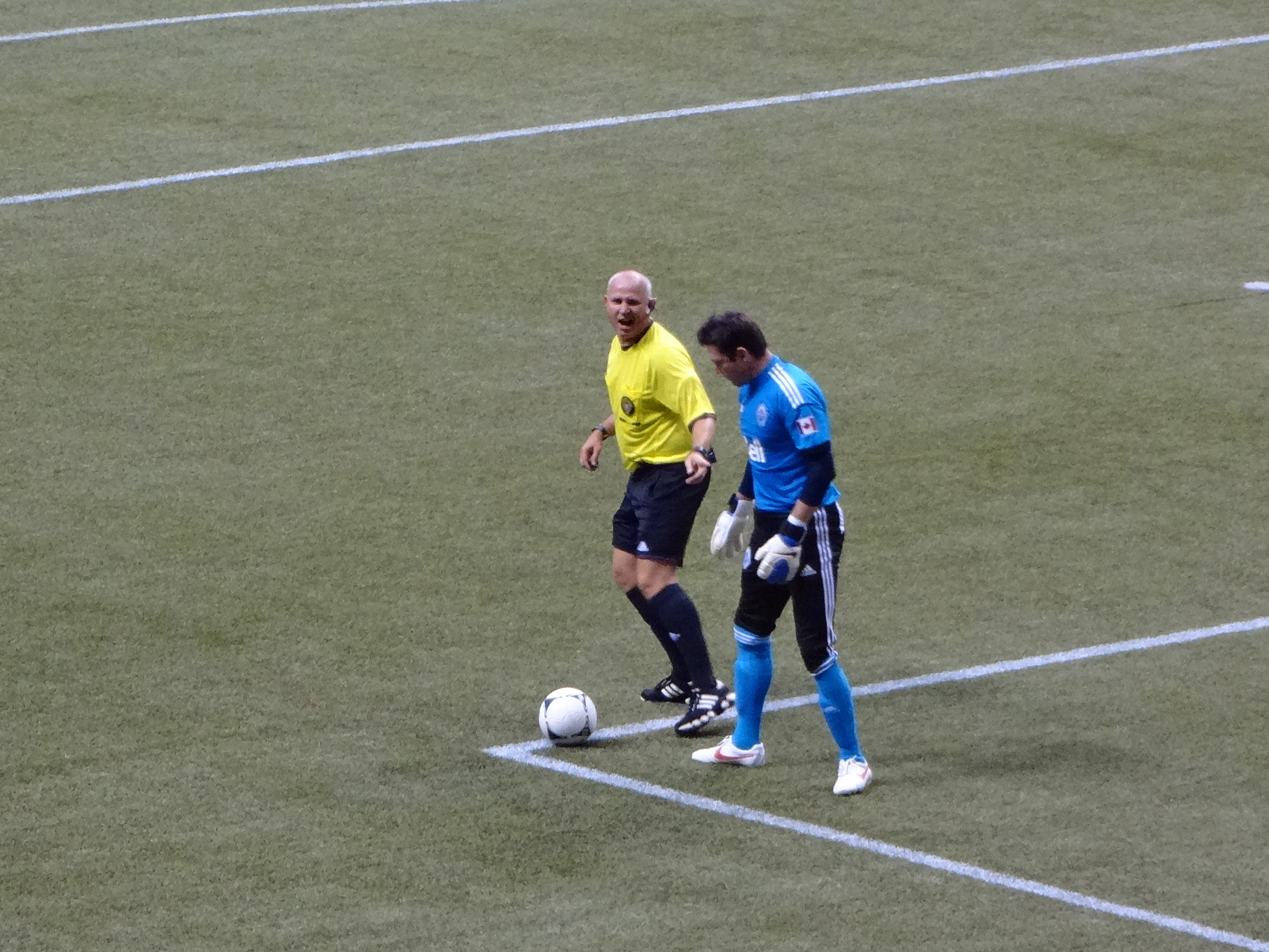 Van vs Col, 16-Jun-2012